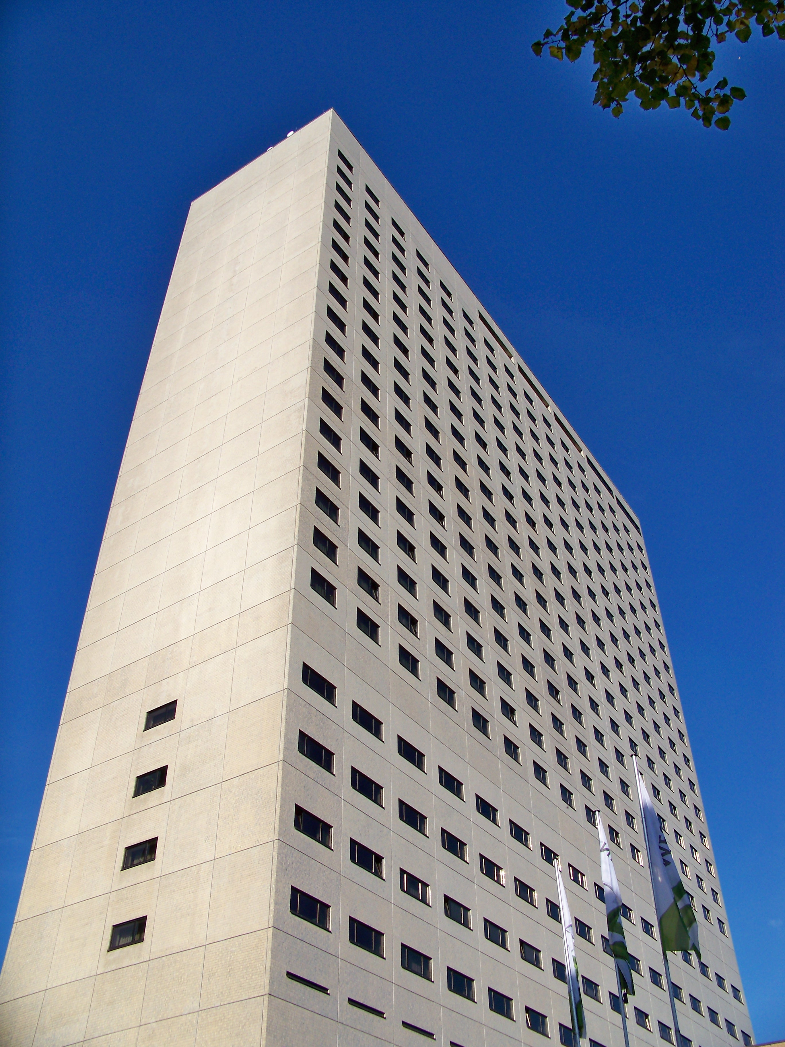 Blick auf die Südfassade des Hotel The Westin Leipzig aus der Nordstraße